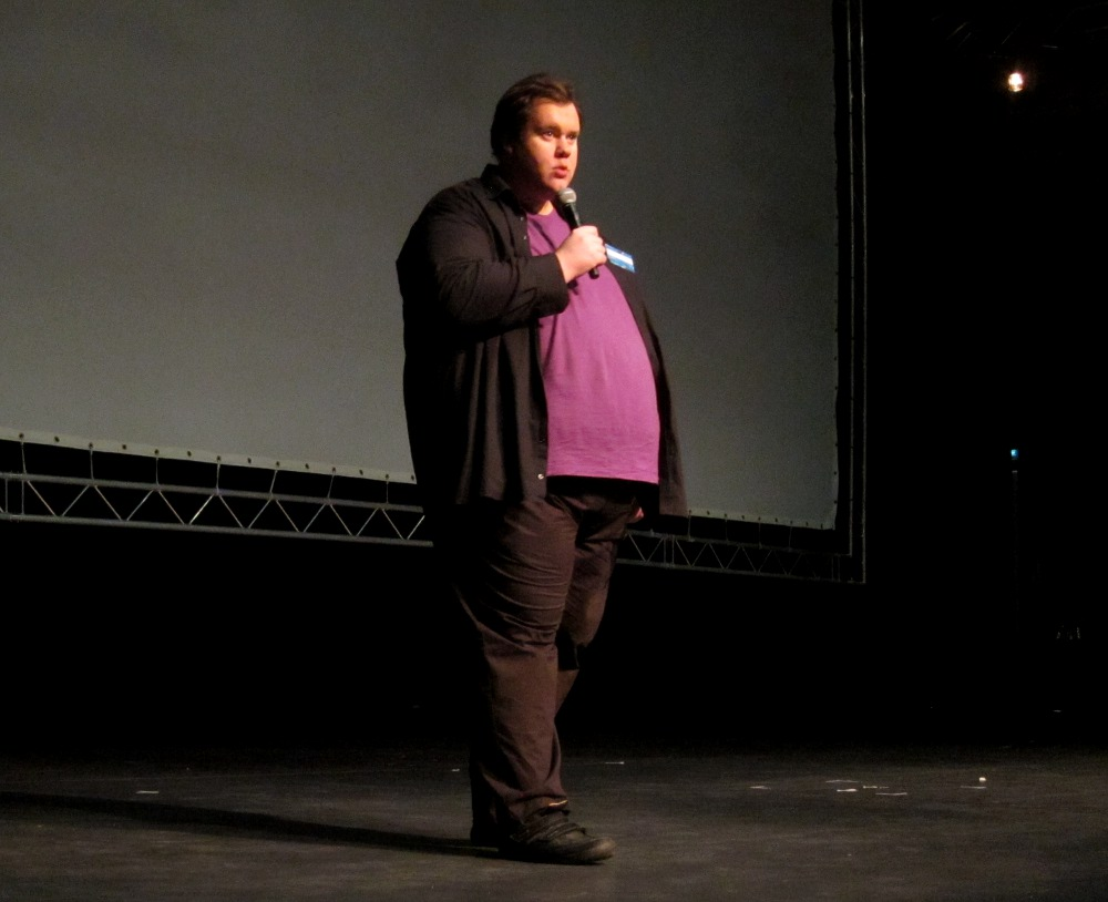 Jarmo Puskala Logomon lavalla Turussa